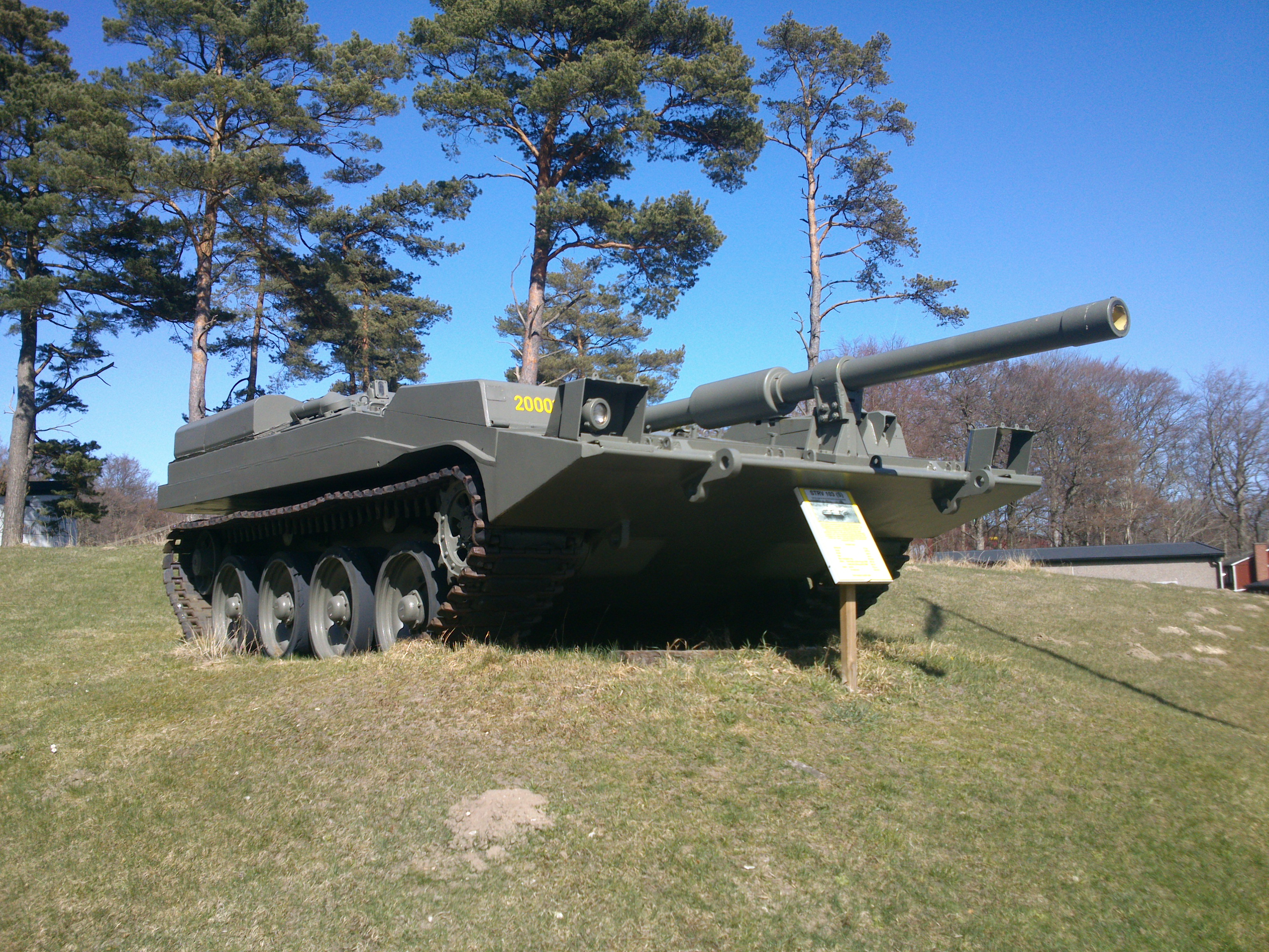 Stridsvagn 103 uppställd vid Ravlunda skjutfält.